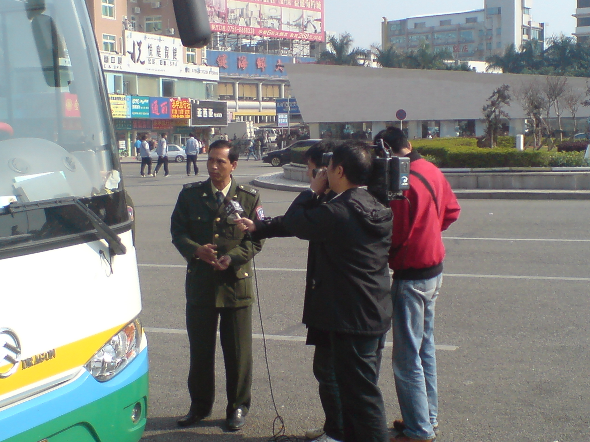 中文（中国大陆）: 珠海电视台正在采访当事人。